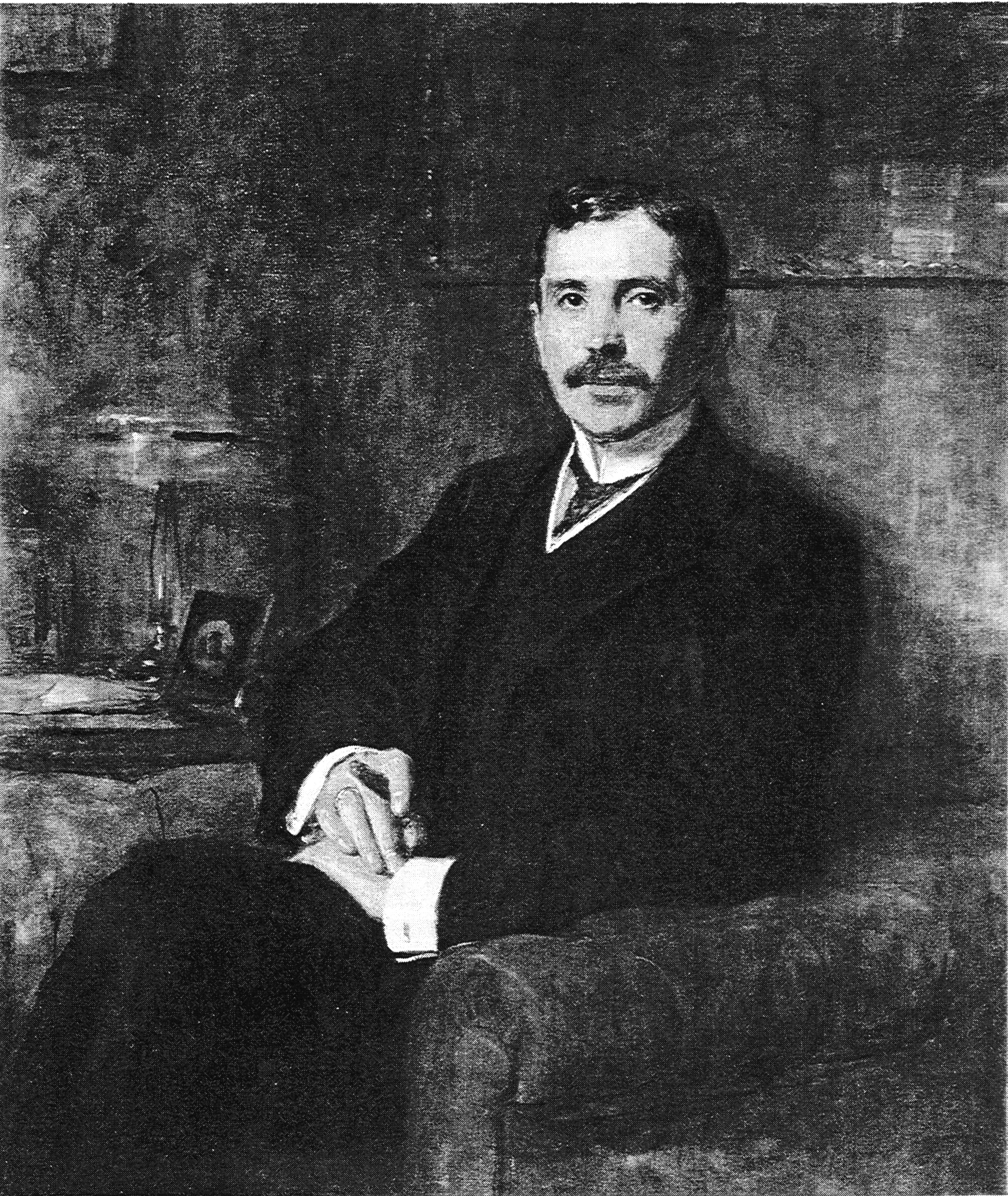 Porträt des Industriellen und Abgeordneten Max Friedmann. Öl/Leinwand, 98 x 112